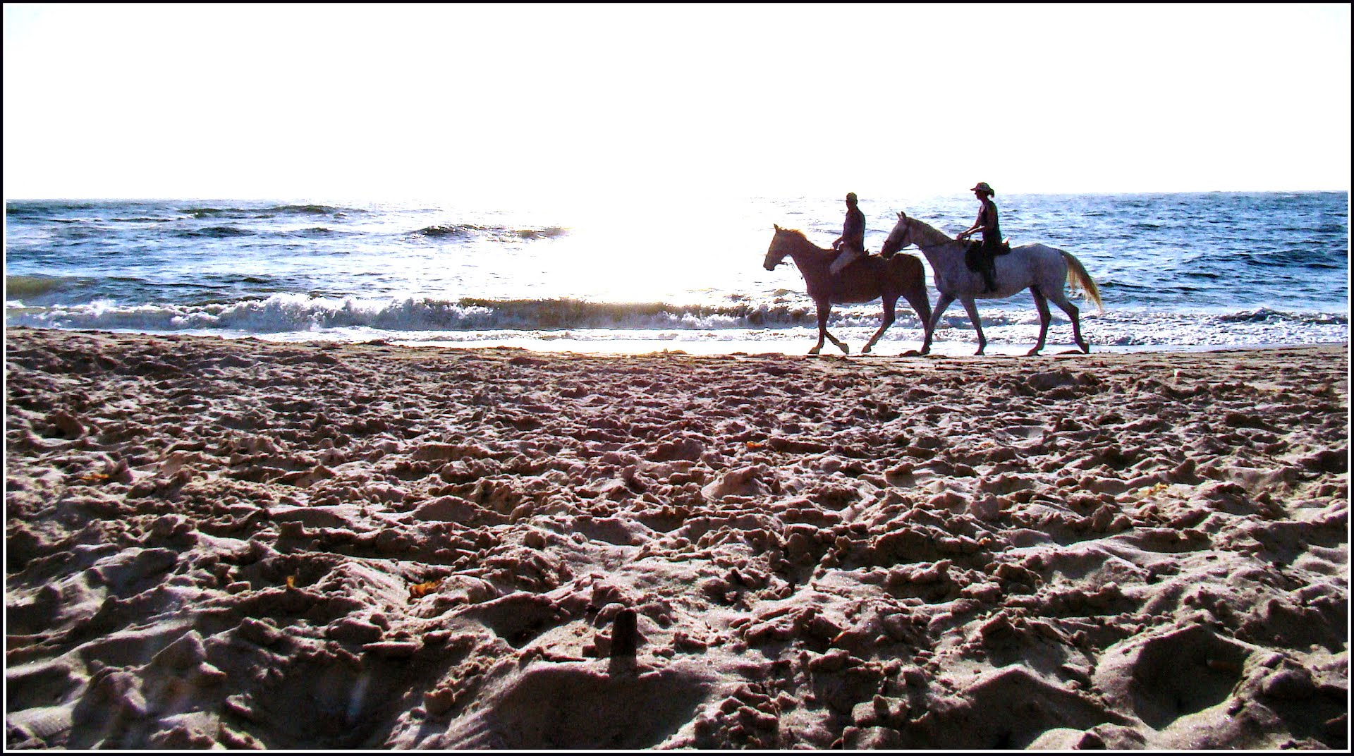 Атлантическое побережье Намибии в районе г. Свакопмунд, март, 2012.